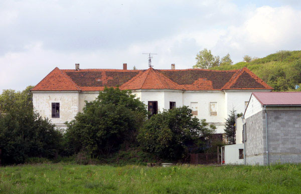 Barokní dům v Nebřezinách. Postavený v 1. čtvrtině cs:18. století M. O. Kondelem, později sloužil jako letní sídlo opatů plaského kláštera, po jeho zrušení jako parketárna. V současnosti v rekonstrukci.